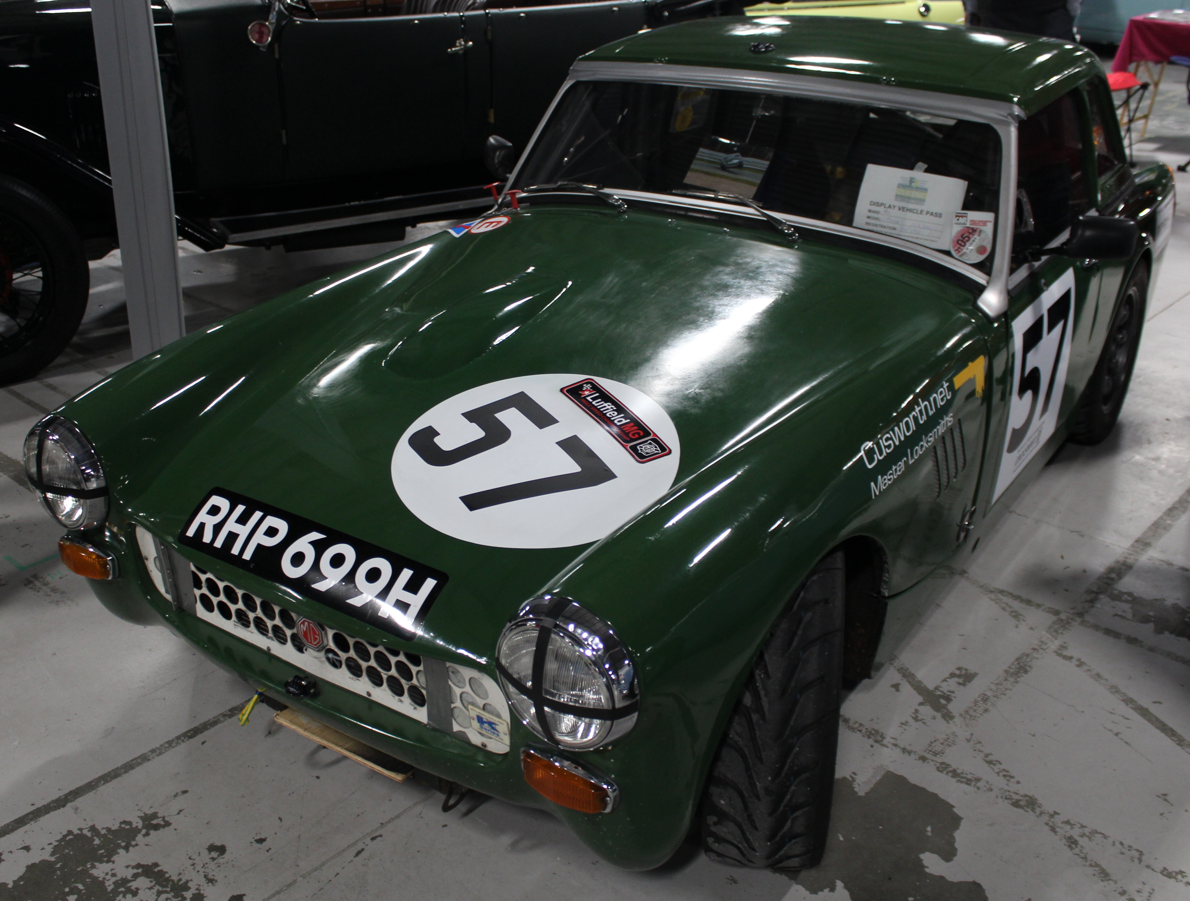 MG Midget race car